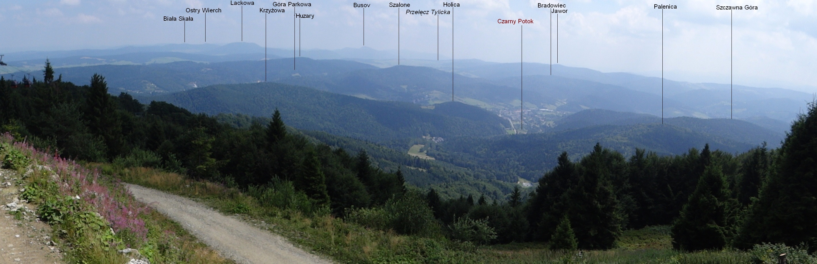 Panorama z Jaworzyny